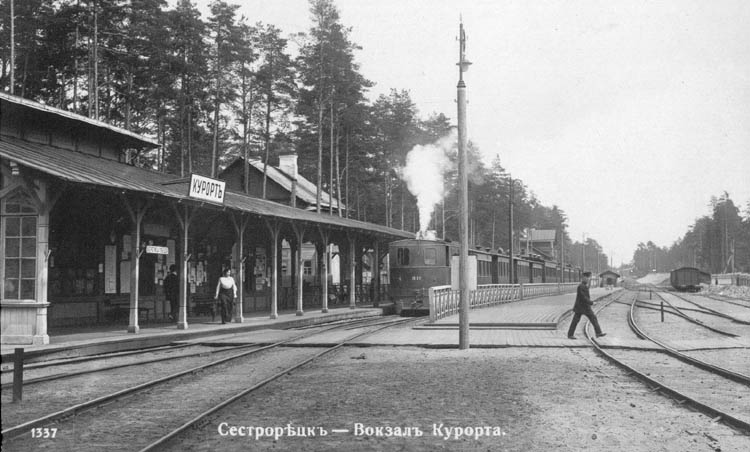 Железнодорожная станция Курорт на дореволюционной открытке